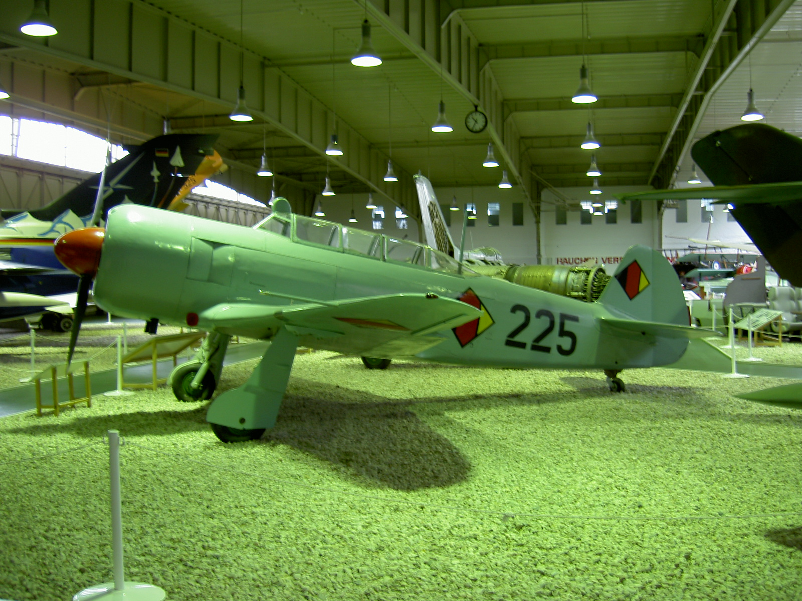 Yakovlev Yak-11 im Luftwaffenmuseum Berlin-Gatow